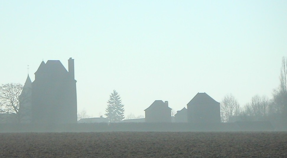 Le château de Chazeuil dans la brume